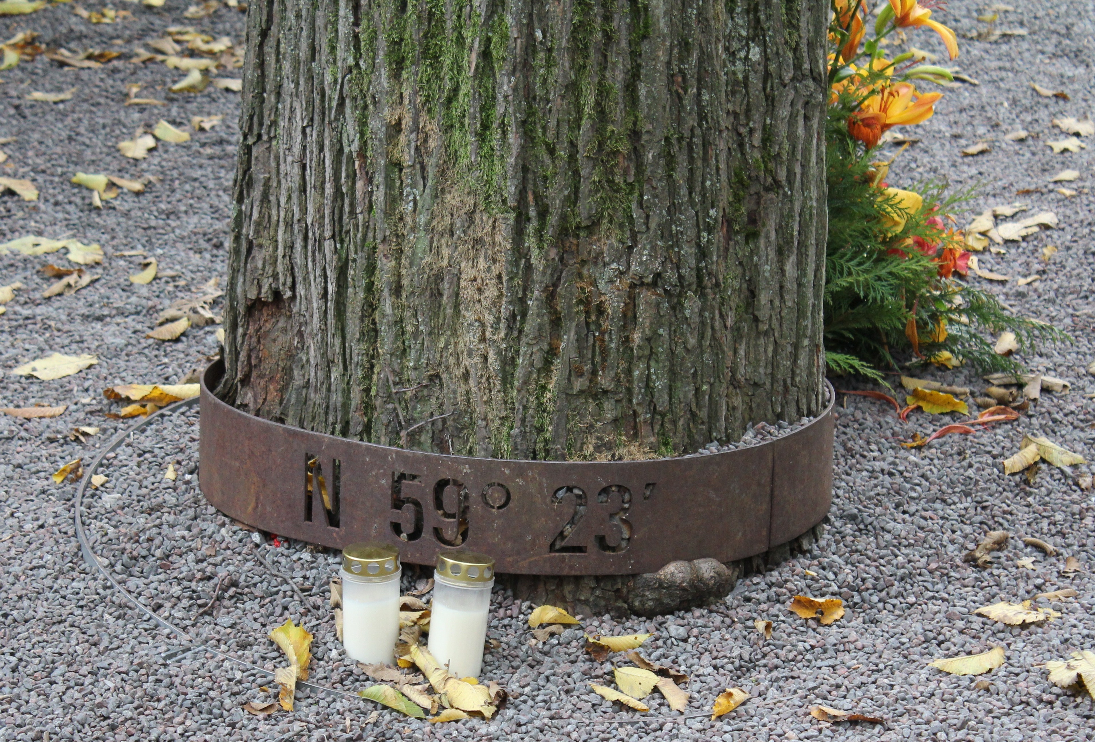 Minnesvård över offren för MS Estonia-katastrofen. Koordinater för fartygets förlisning.